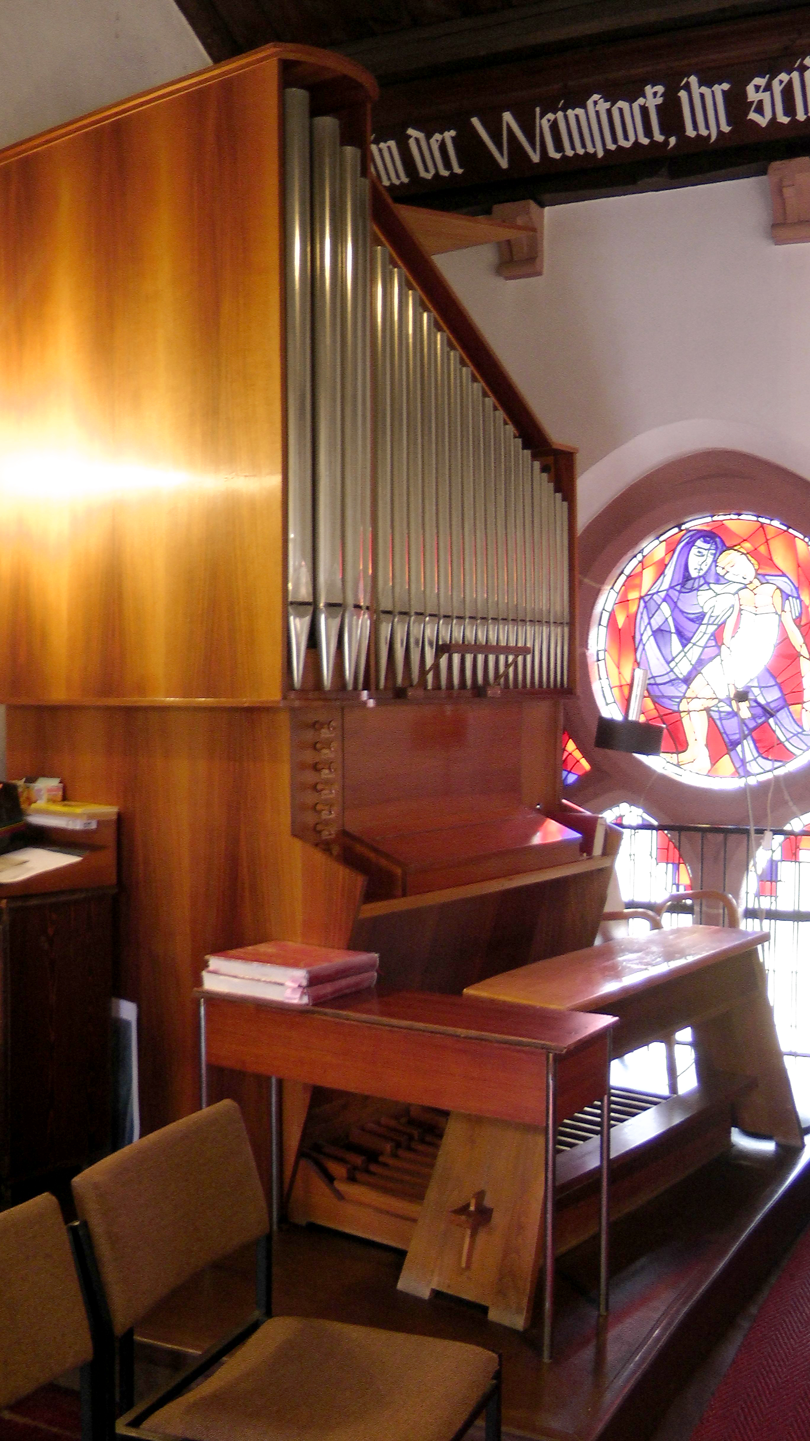 Evangelische Kirch Saarburg - Orgel aus der Orgelbauerwerkstatt Eule (Bautzen)